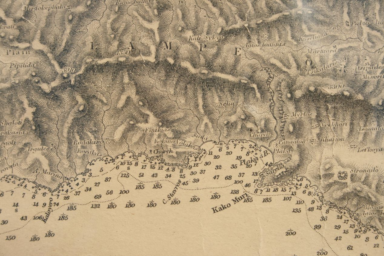 Ausschnitt einer historische Karte von Kreta, 1851 unter der Leitung von Thomas Abel Brimage Spratt erstellt. Region der heutigen Gemeinde Finikas